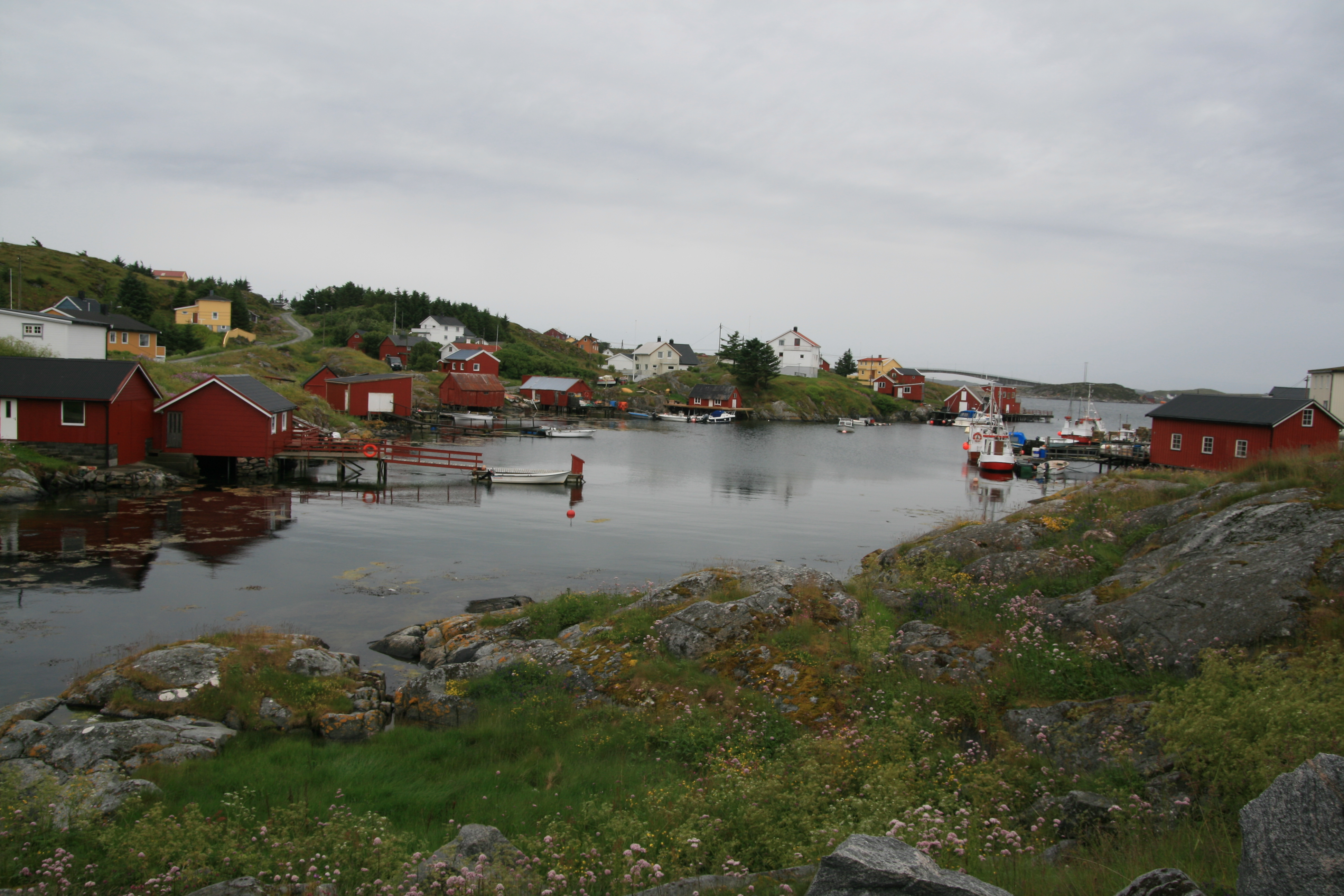 Måøyholet